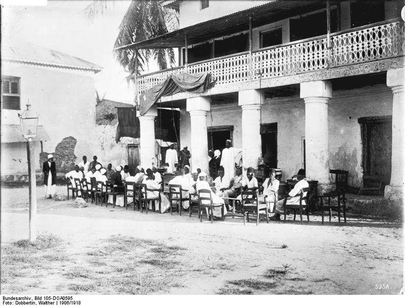 Eingeborenen-Kaffee in Bagamojo